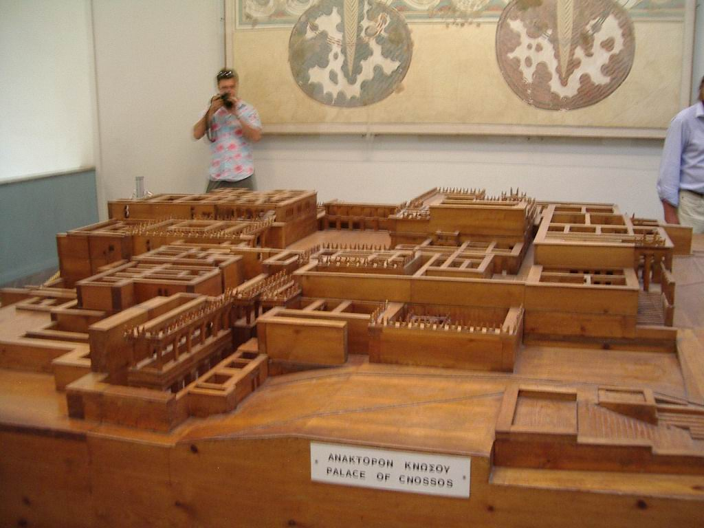 Museu arqueològic de Creta a Heràkleion, foto feta per J. Ollé el 6 d'agost del 2005.